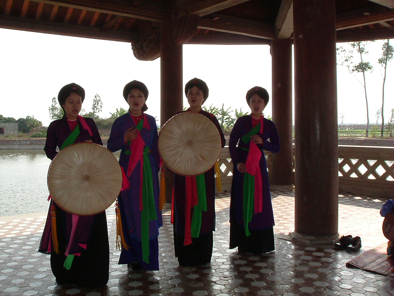 Quan Ho-Ensemble am Đền Đô-, auch Lý Bát Đế-Tempel, Bac Ninh